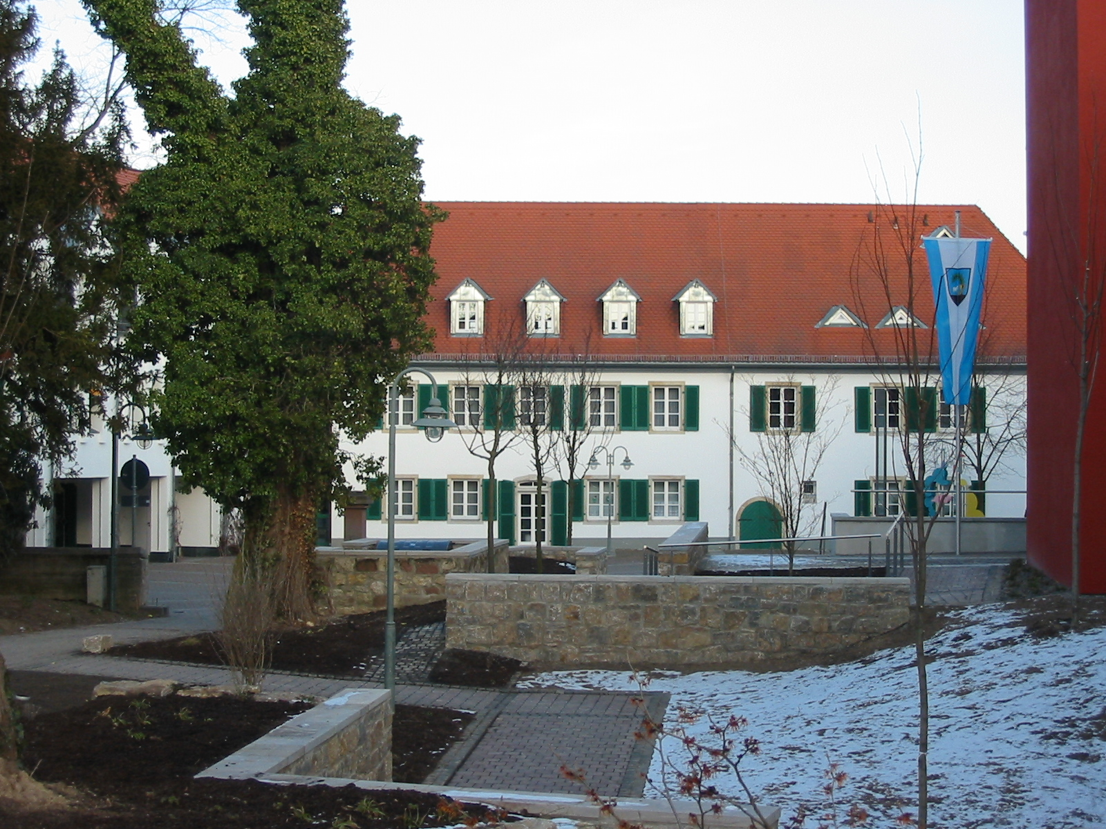 Ehemaliger Breidenbacher Hof; spätbarocker Krüppelwalmdachbau, bezeichnet 1774, Erweiterung 1905; „Dolleskeller“: zweiteiliger, dreischiffiger Gewölbekeller, böhmische Kappen auf romanisierenden Gusseisensäulen um 1860, Architekt Johann Philipp Geil I, Eimsheim